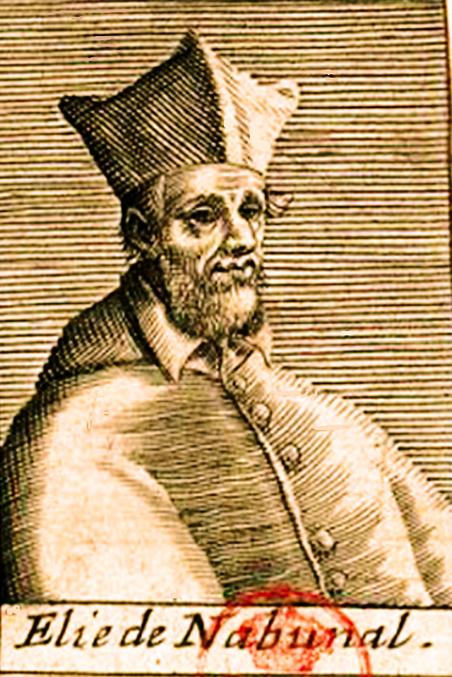 Cardinal Élie de Nasbinal